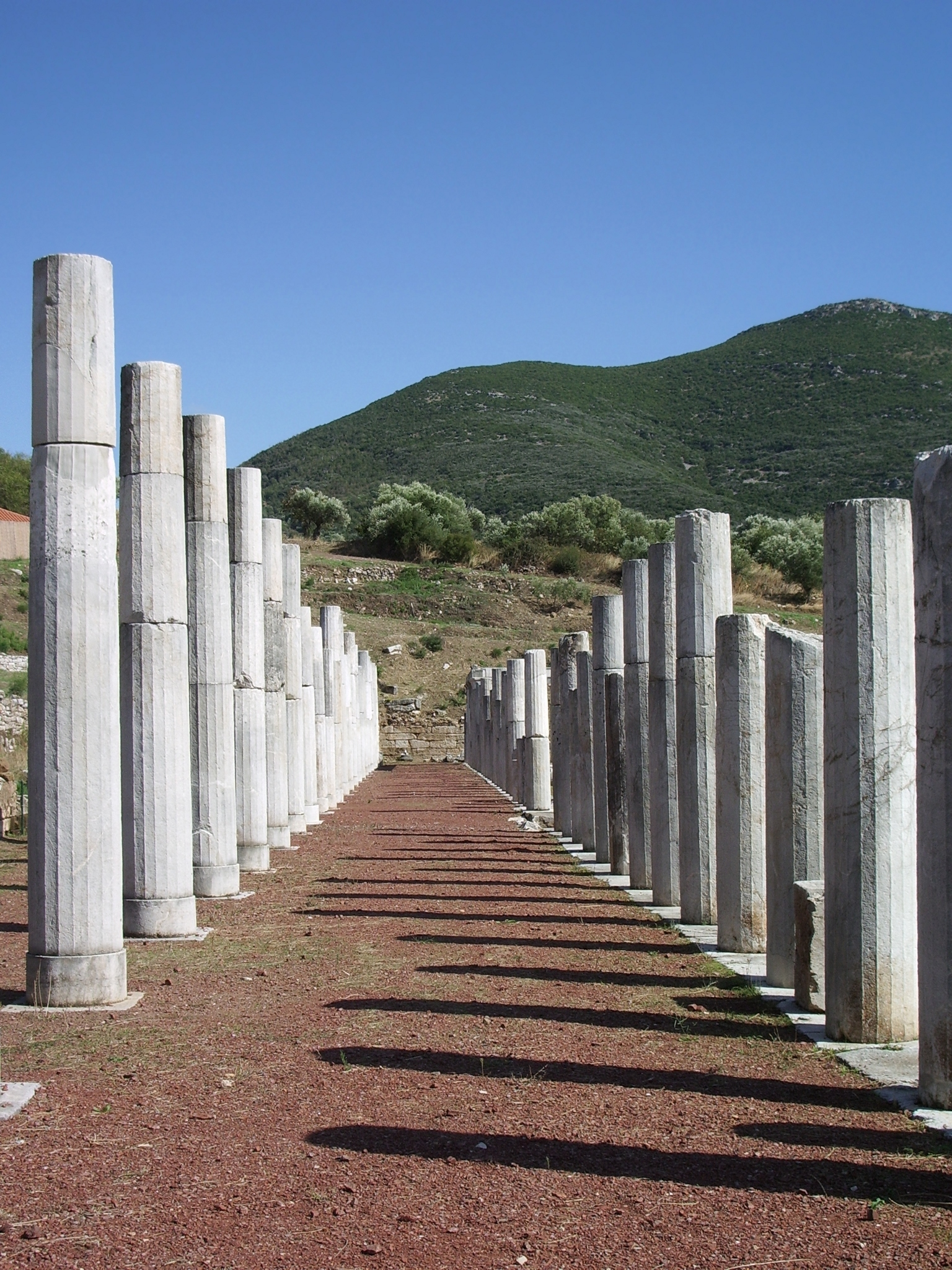 Säulenreihe an Nordseite des antiken Stadions in Messene